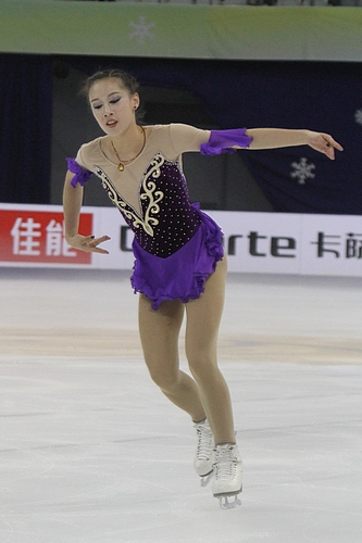 Чжу Цюин на Кубке Китая 2011